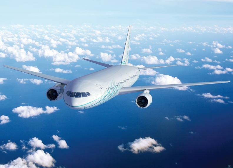 General view of the aircraft "frigate ecojet"